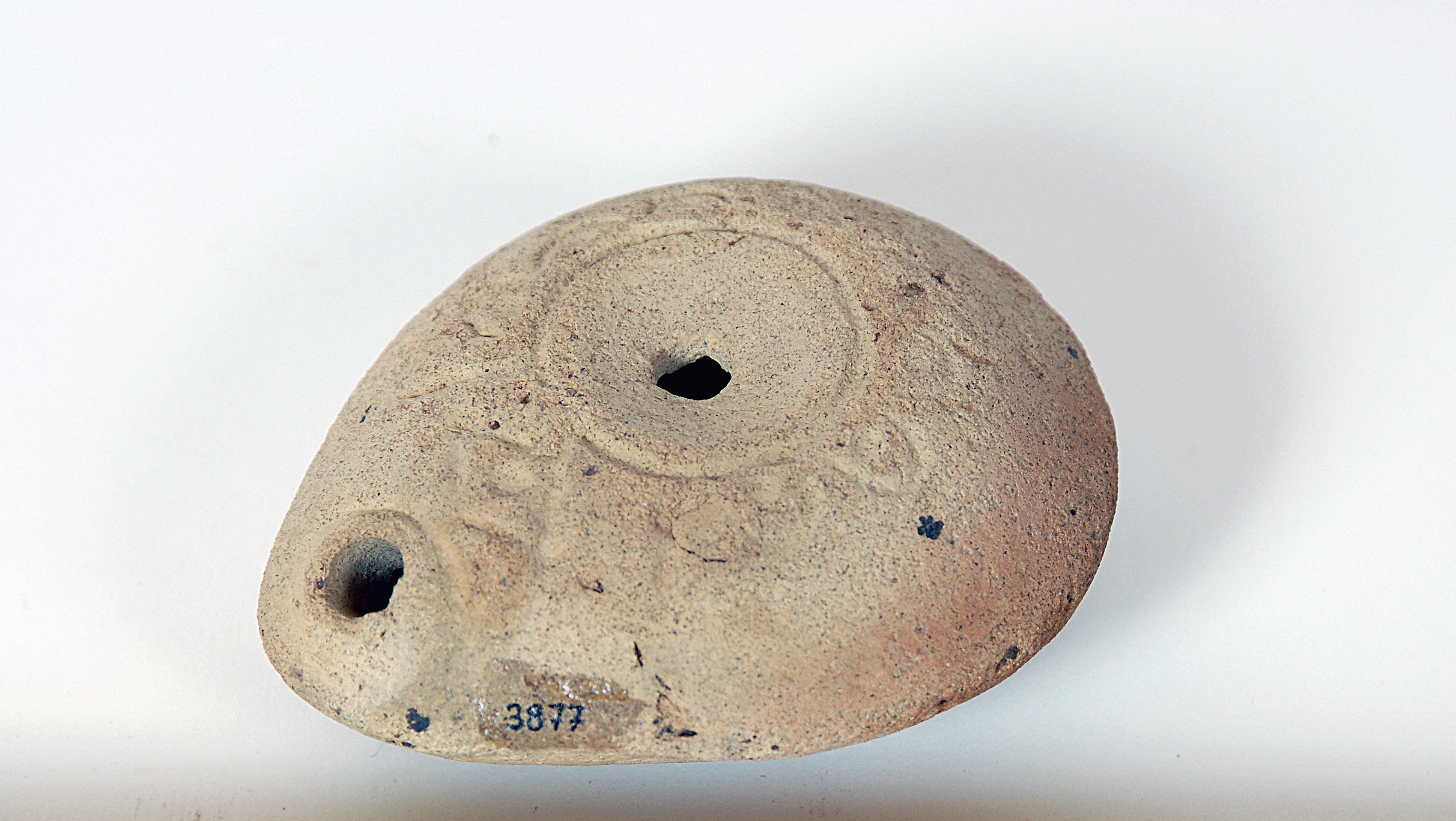 luminaria de aceite, de arcilla áspera. Su forma es ovalada con un dos oberturas, una lateral y otra en la parte superior. Decorada con incisiones en forma de flor.